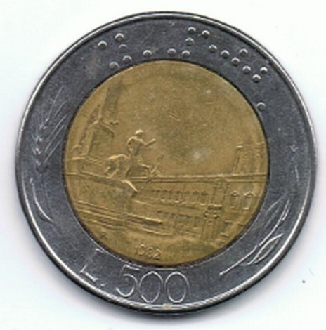 500 Lire Italiane